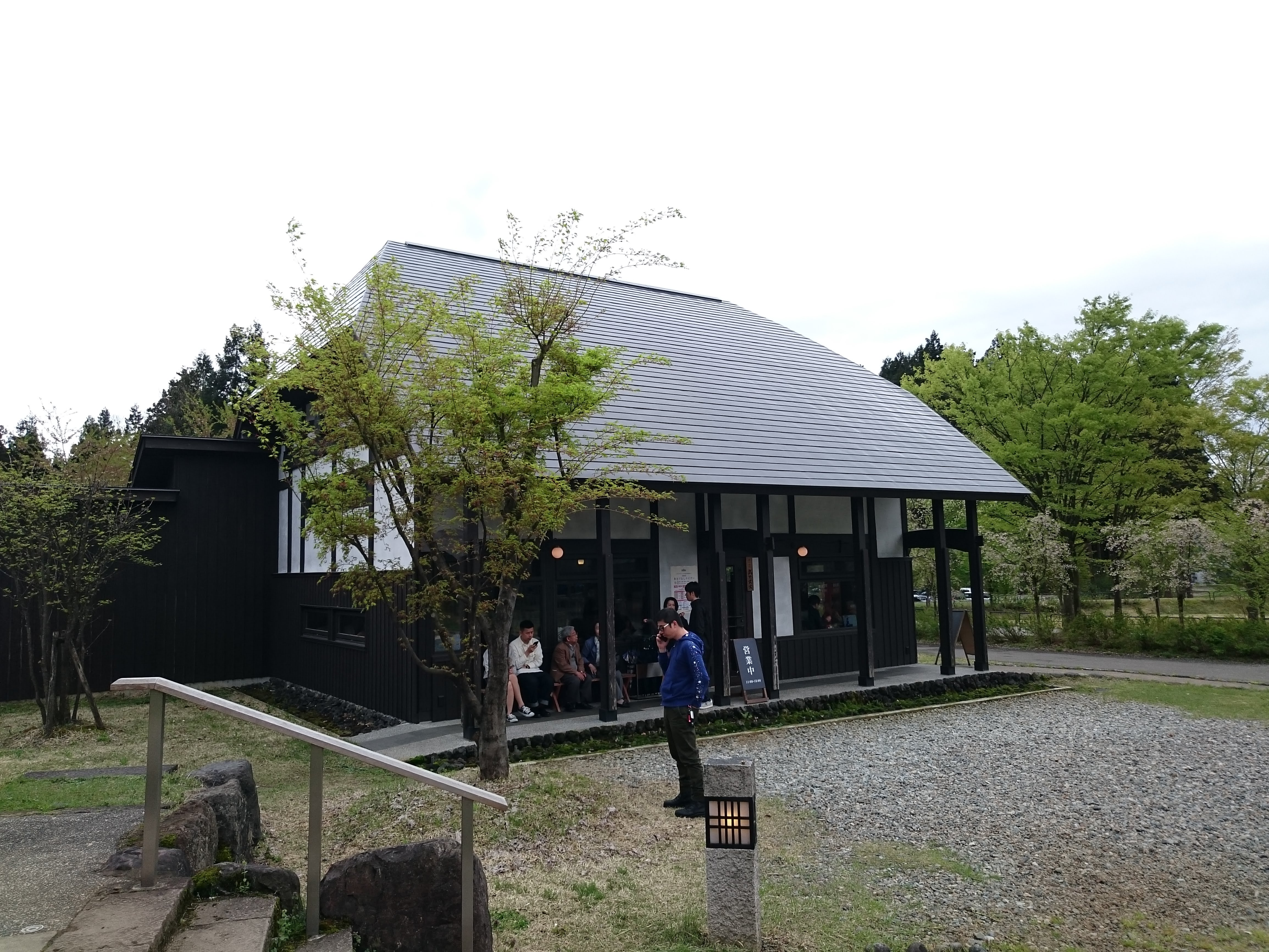 城内食堂 武火文火の外観